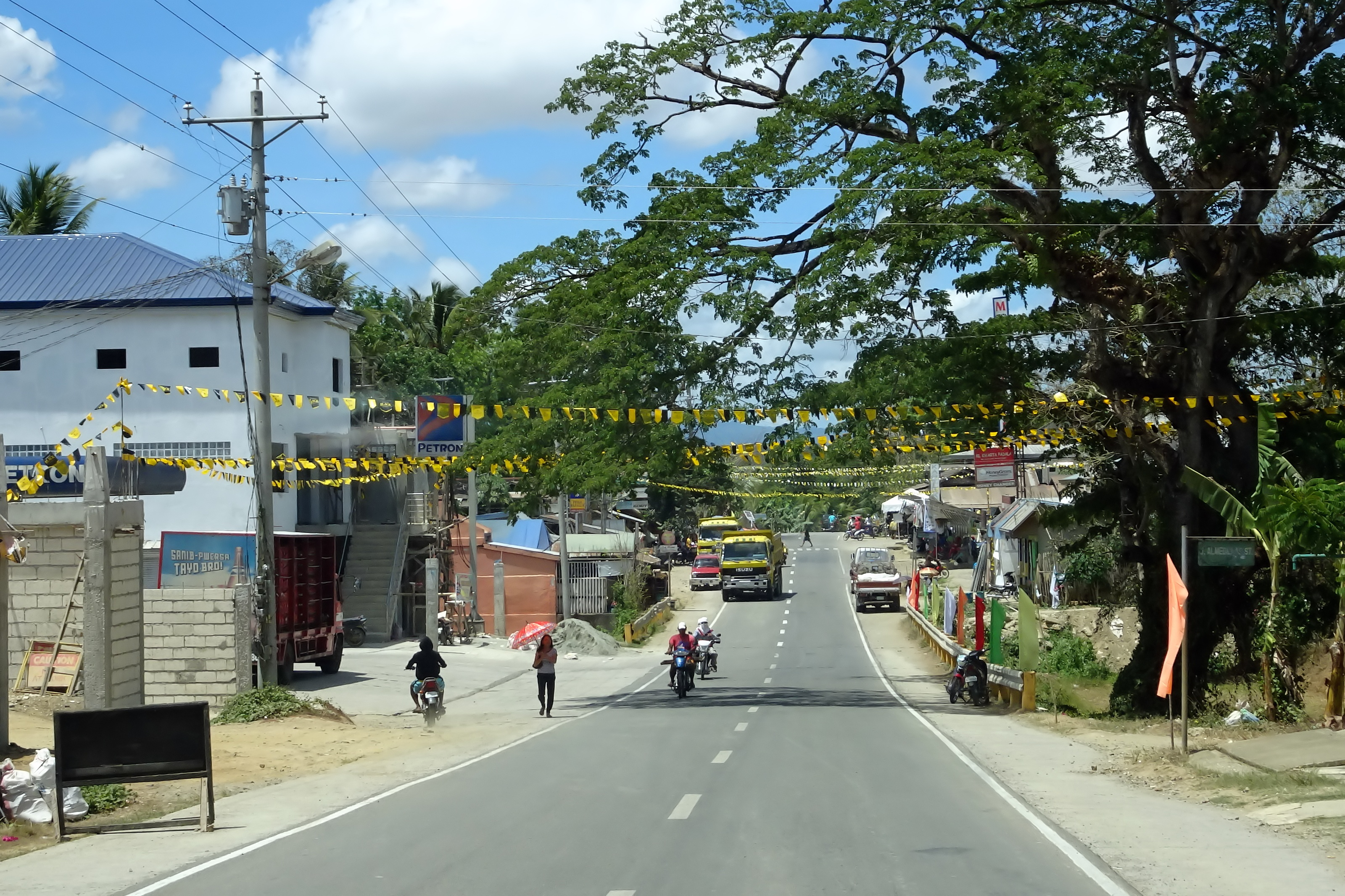 San Miguel, Bohol, Philippines